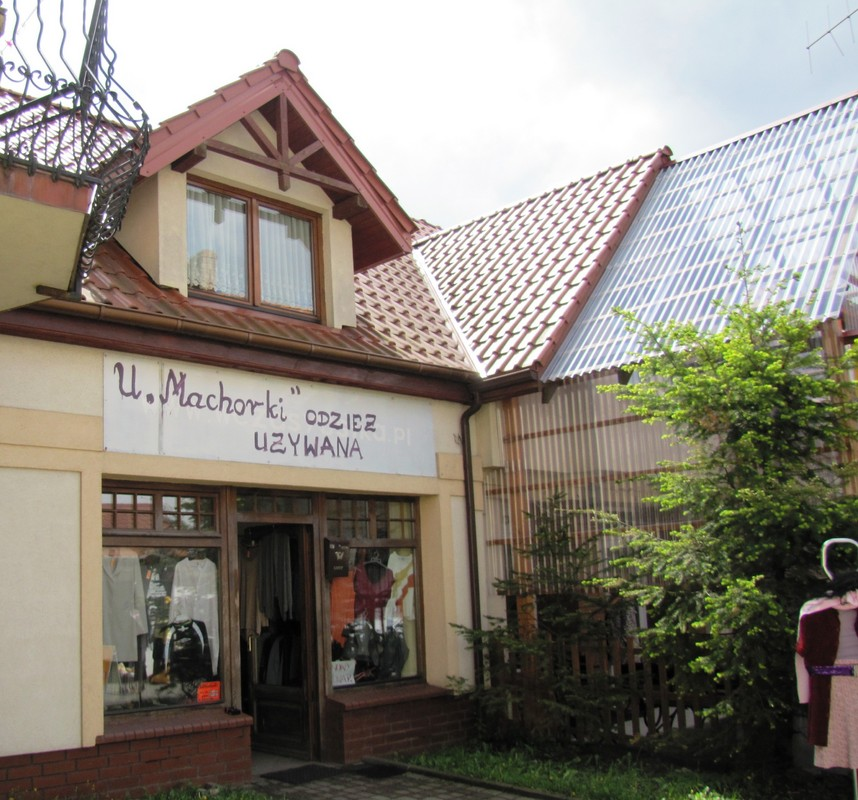 CIUCHOLAND.